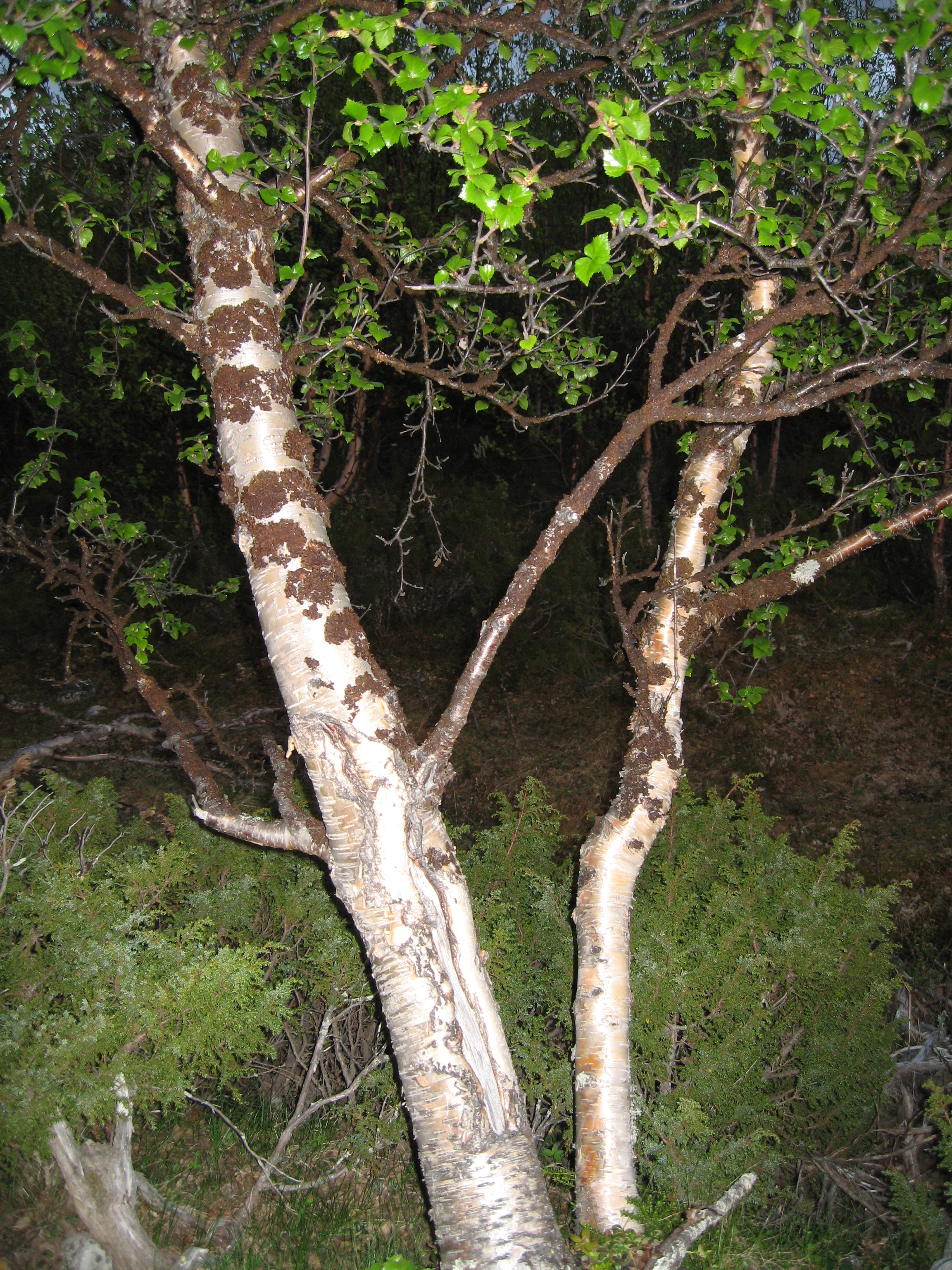 Melanelia (or melanohalea) olivacea